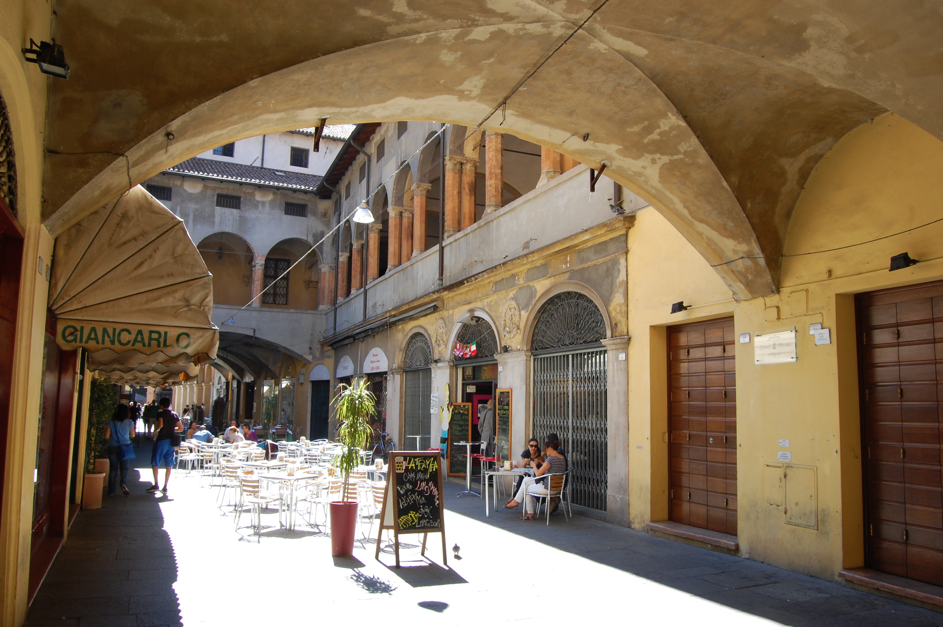 Piazza Prampolini (vicinanze)